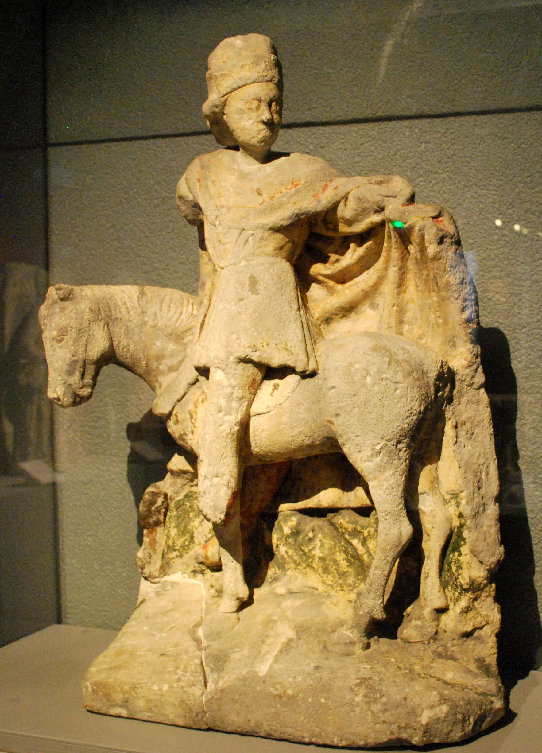 Villenave d'Ornon sculpture saint Martin